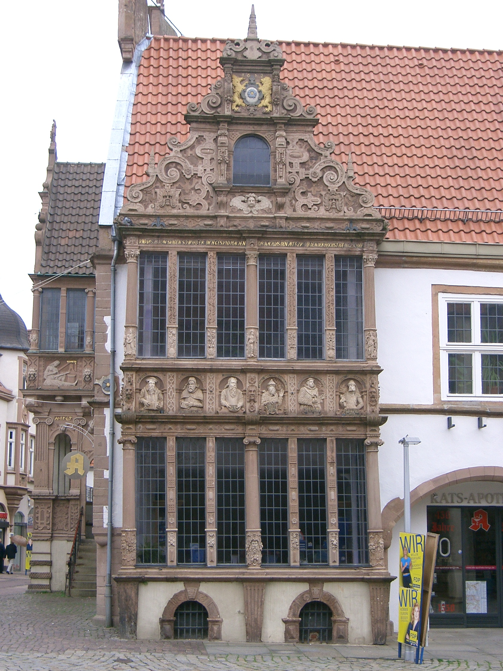 Rathaus in Lemgo: Utlucht des Apothekerbaus, ab 1611.